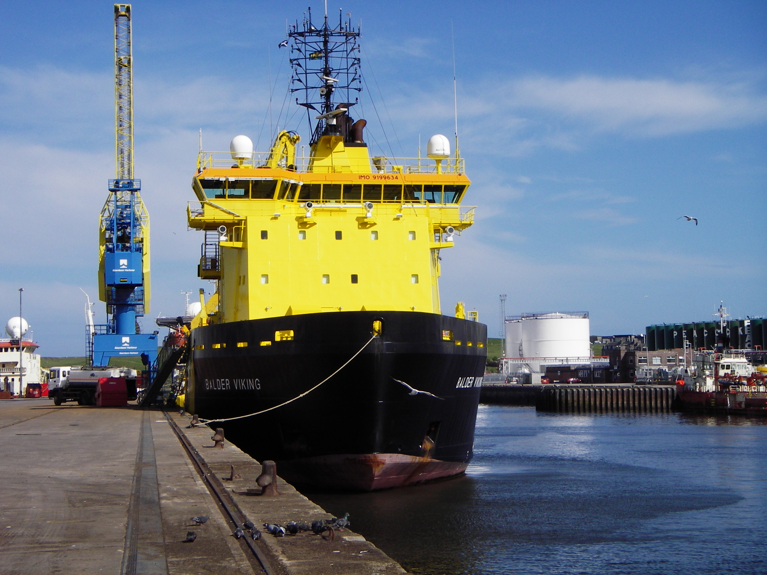 Balder Viking in Aberdeen IMO number: 9199634